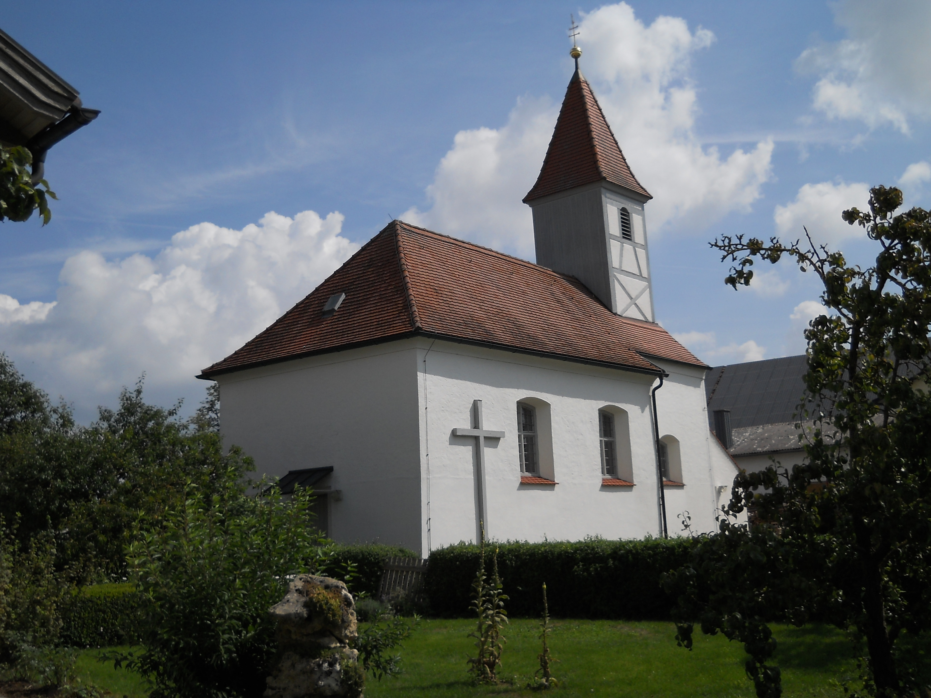 Die Kirche "Kreuzauffindung" von Heiligenkreuz, einem Gemeindeteil von Titting im oberbayerischen Landkreis Eichstätt